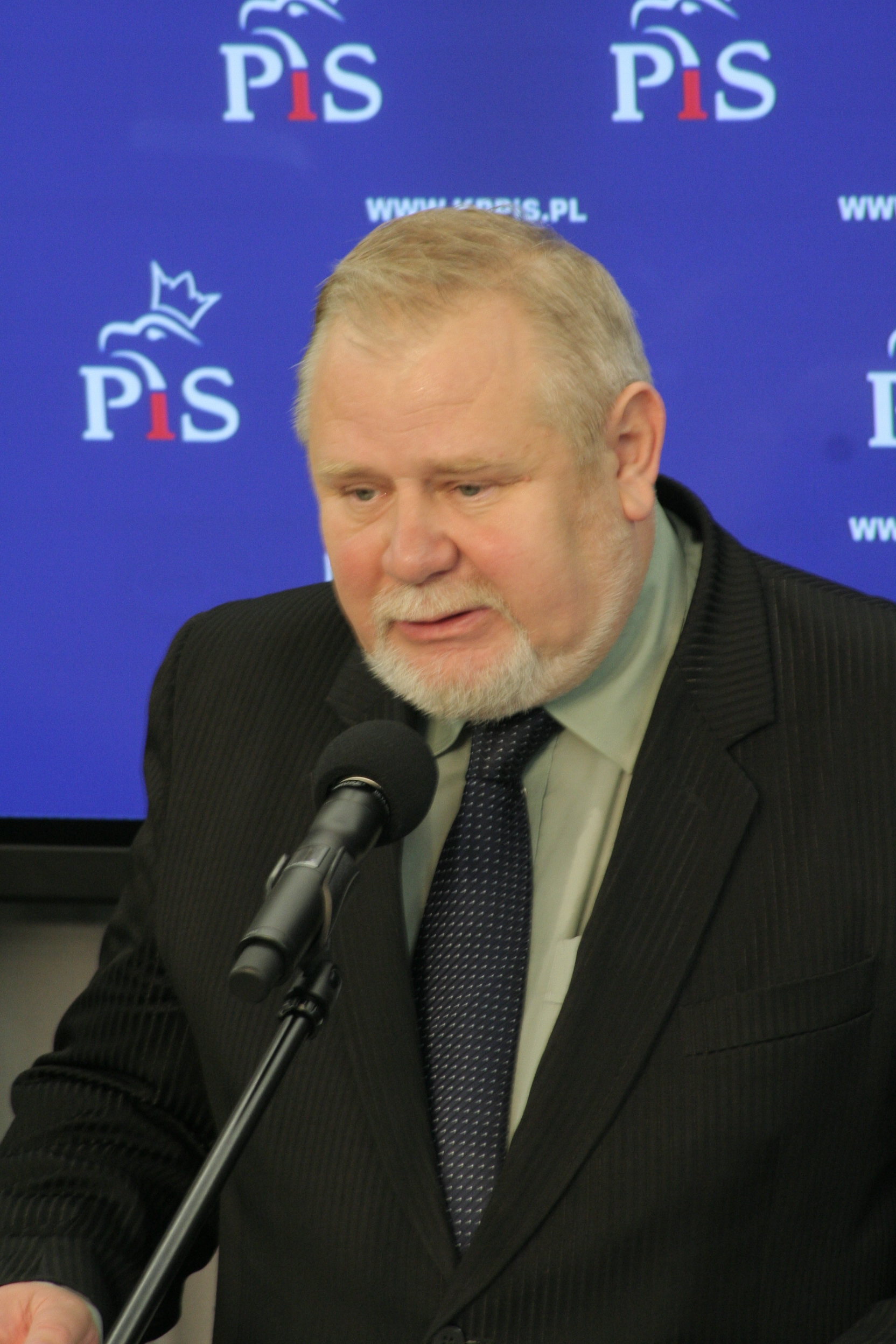 Jacek Falfus konferencja prasowa 1.10.2008 PZPN